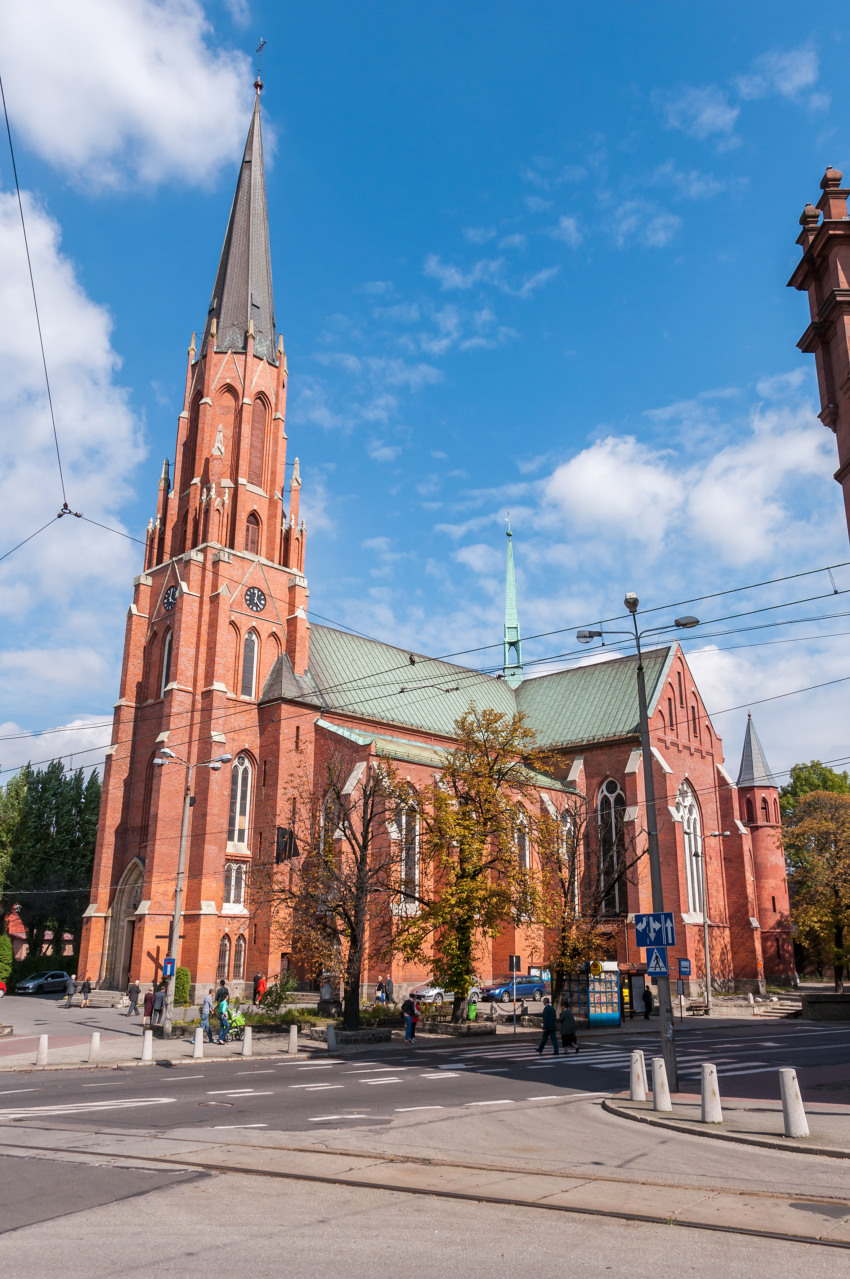 Mysłowice, ul. Starokościelna 1. Kościół par. pw. Najświętszego Serca Pana Jezusa, 1888-1891.